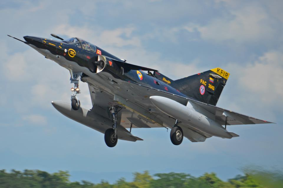 avión caza bombardero colombiano